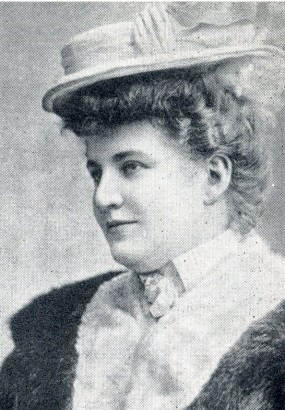 Švandová-Kadlecová Emma, česká herečka